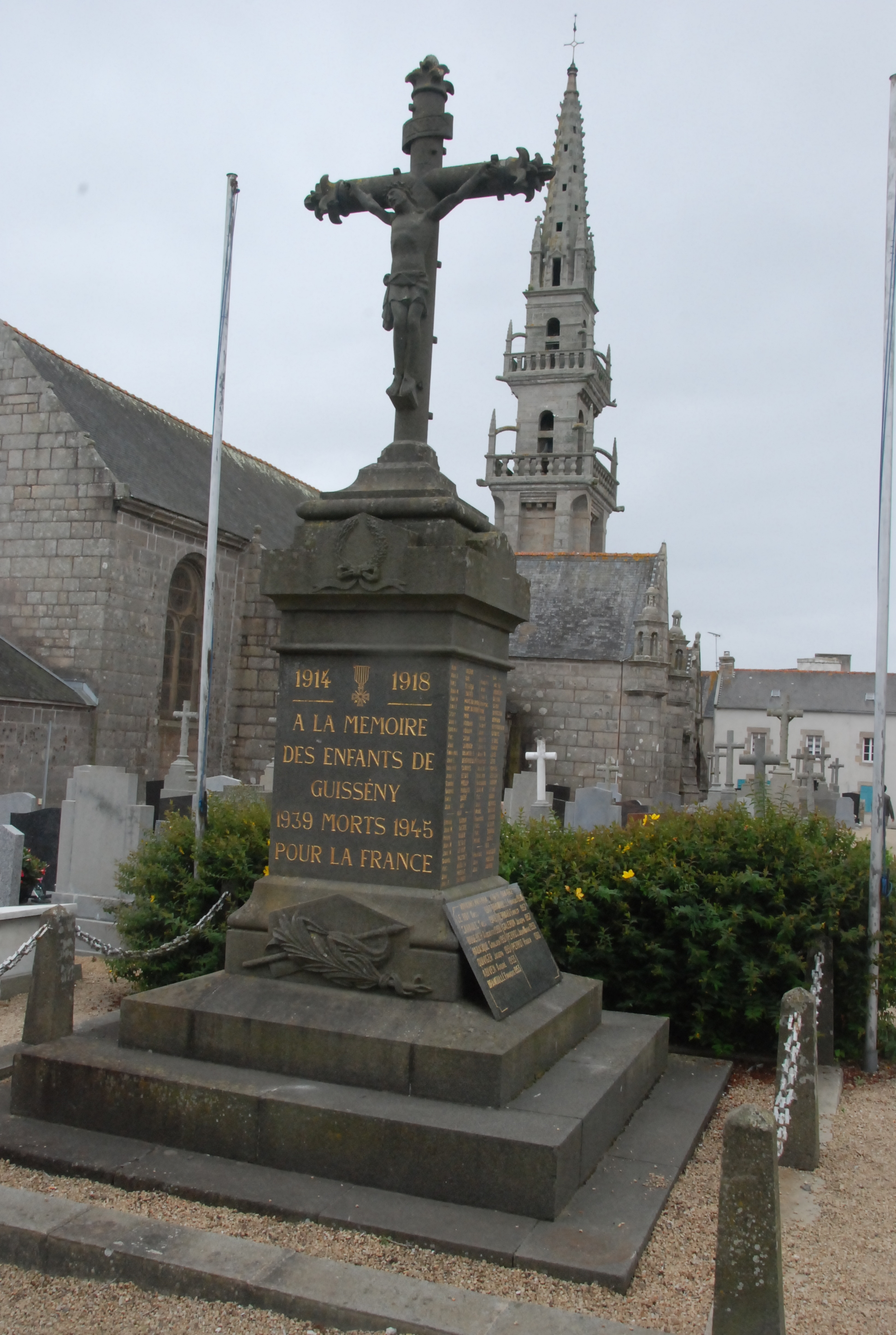 Monument aux morts - Guissény - 29